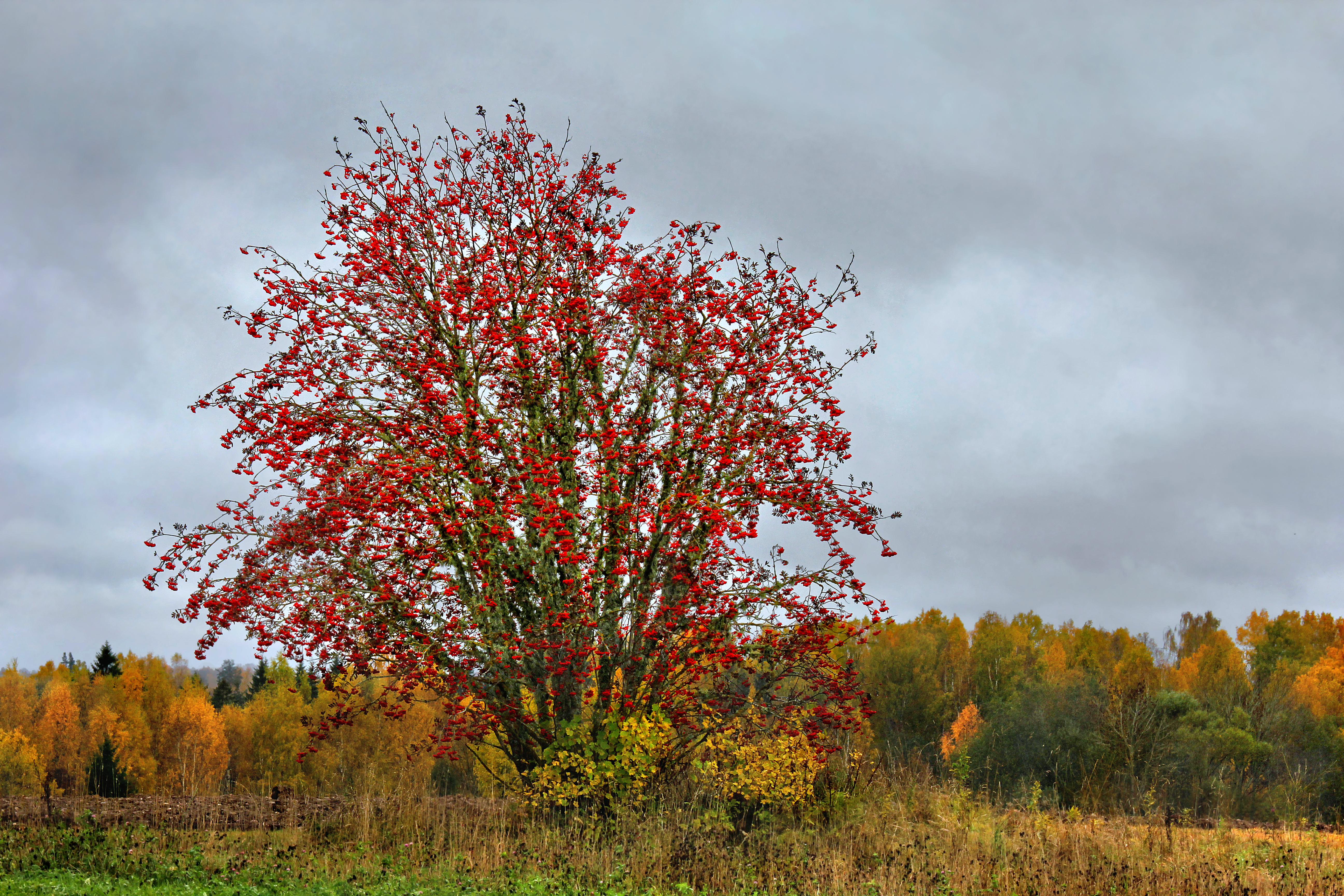 Pihlakas on pilgupüüdjaks sügismaastikus